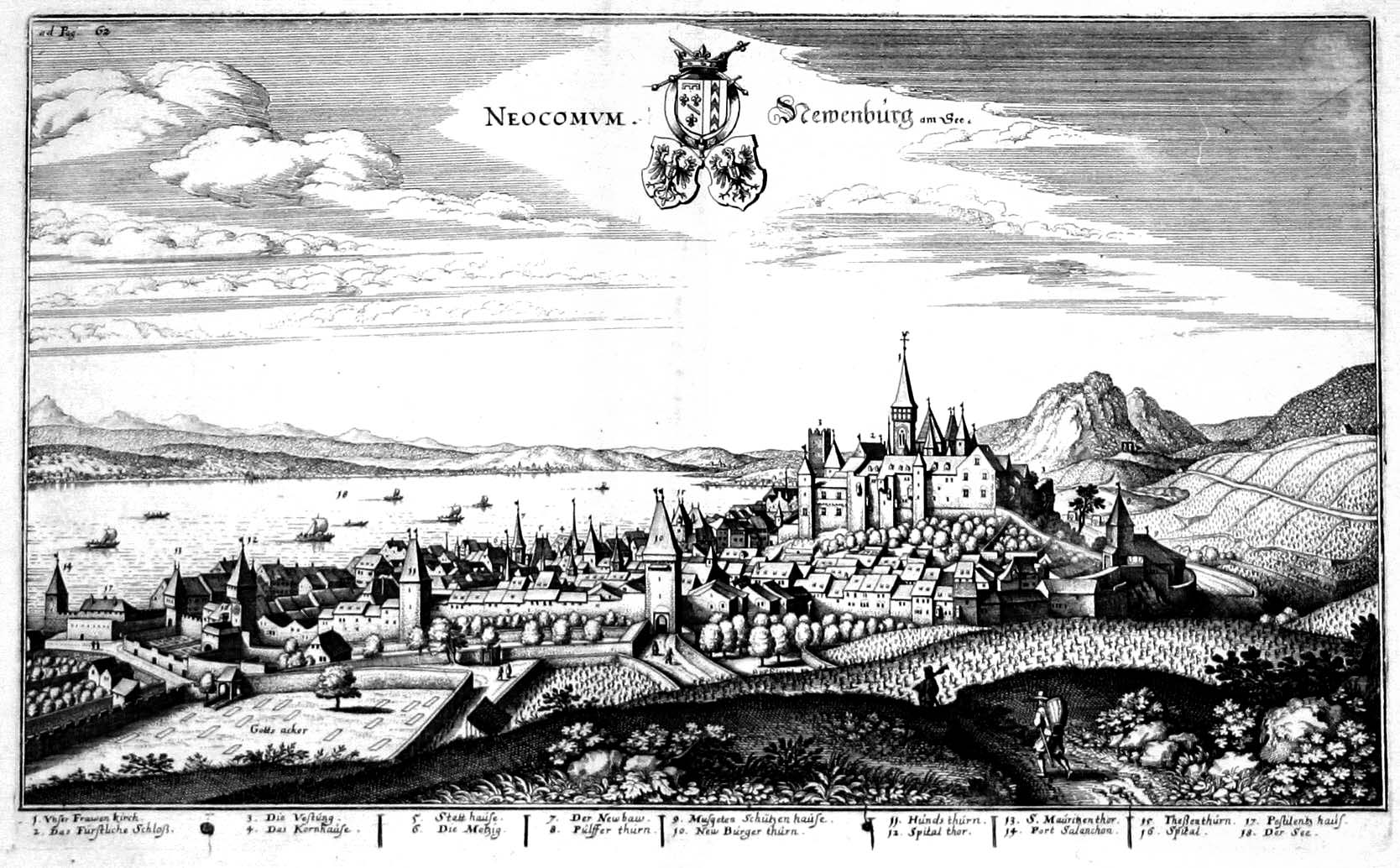 Neuchâtel vue de l'est par Mérian